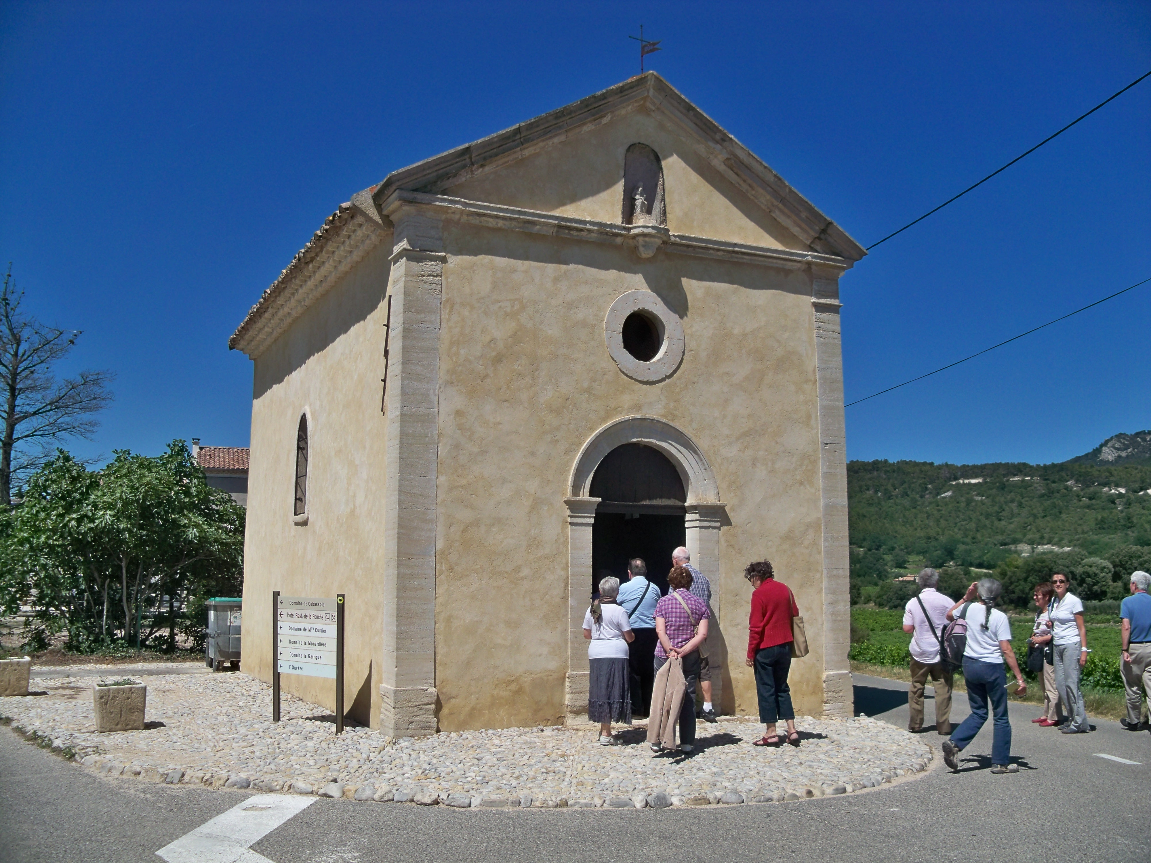 Notre Dame de la Brune, à Vacqueyras (84)